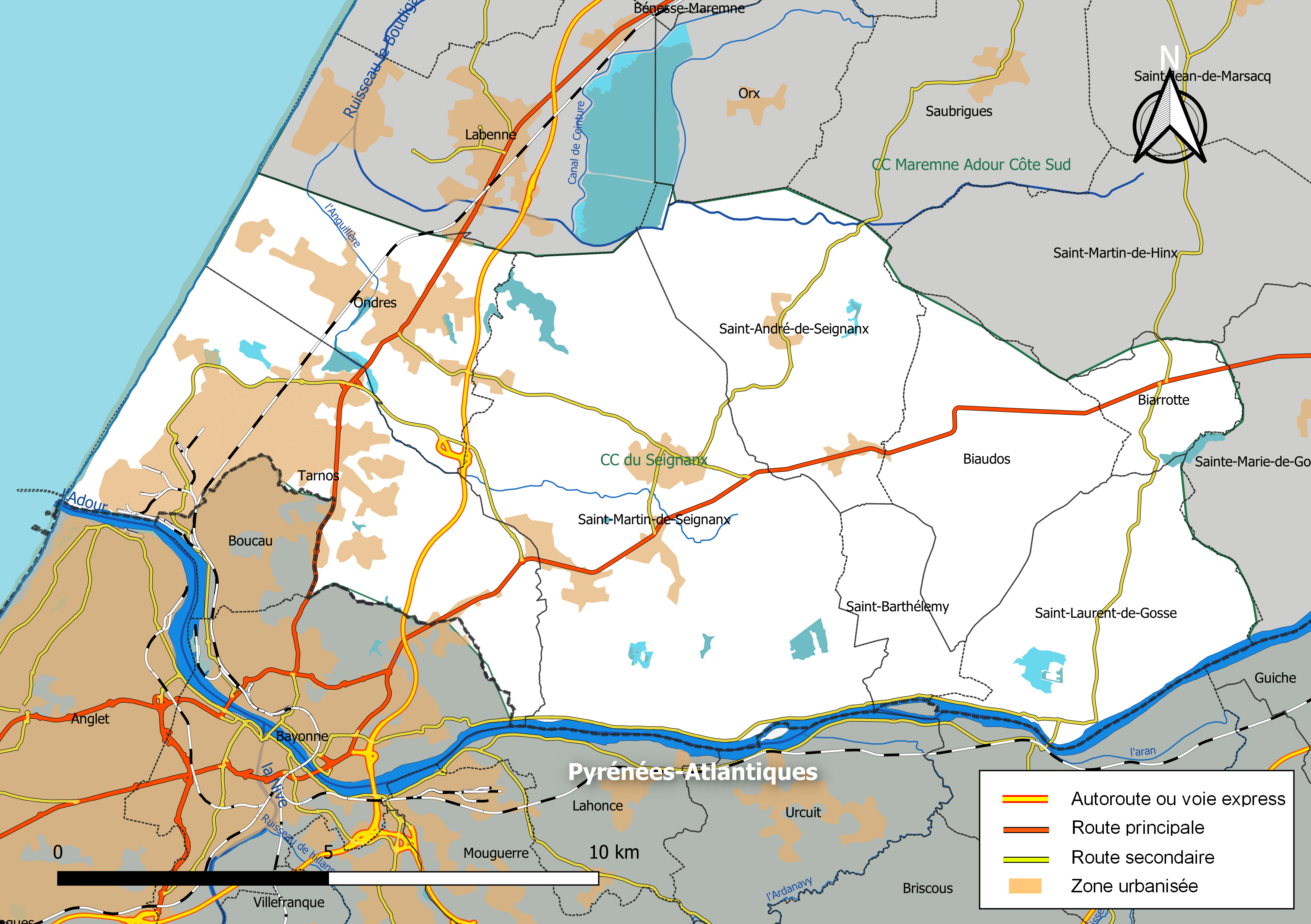 Carte géographique de la Communauté de communes du Seignanx, département des Landes, France. Composition au 1er janvier 2019.